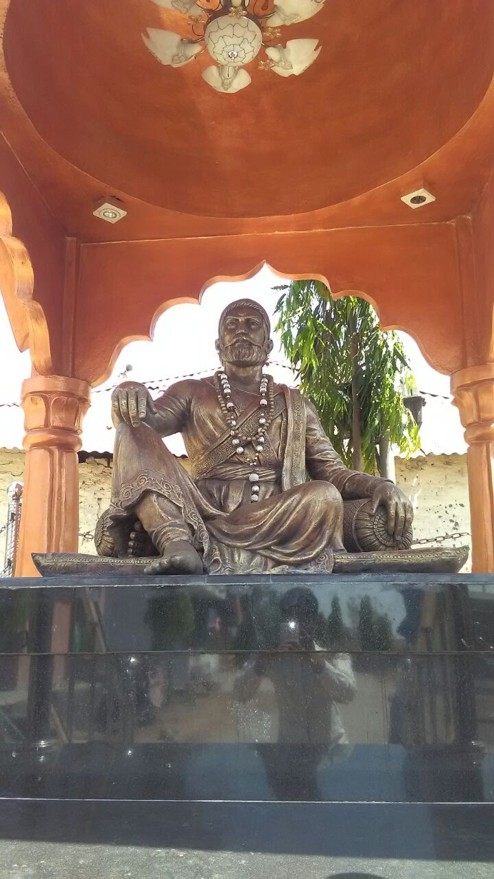 शिवस्मारक